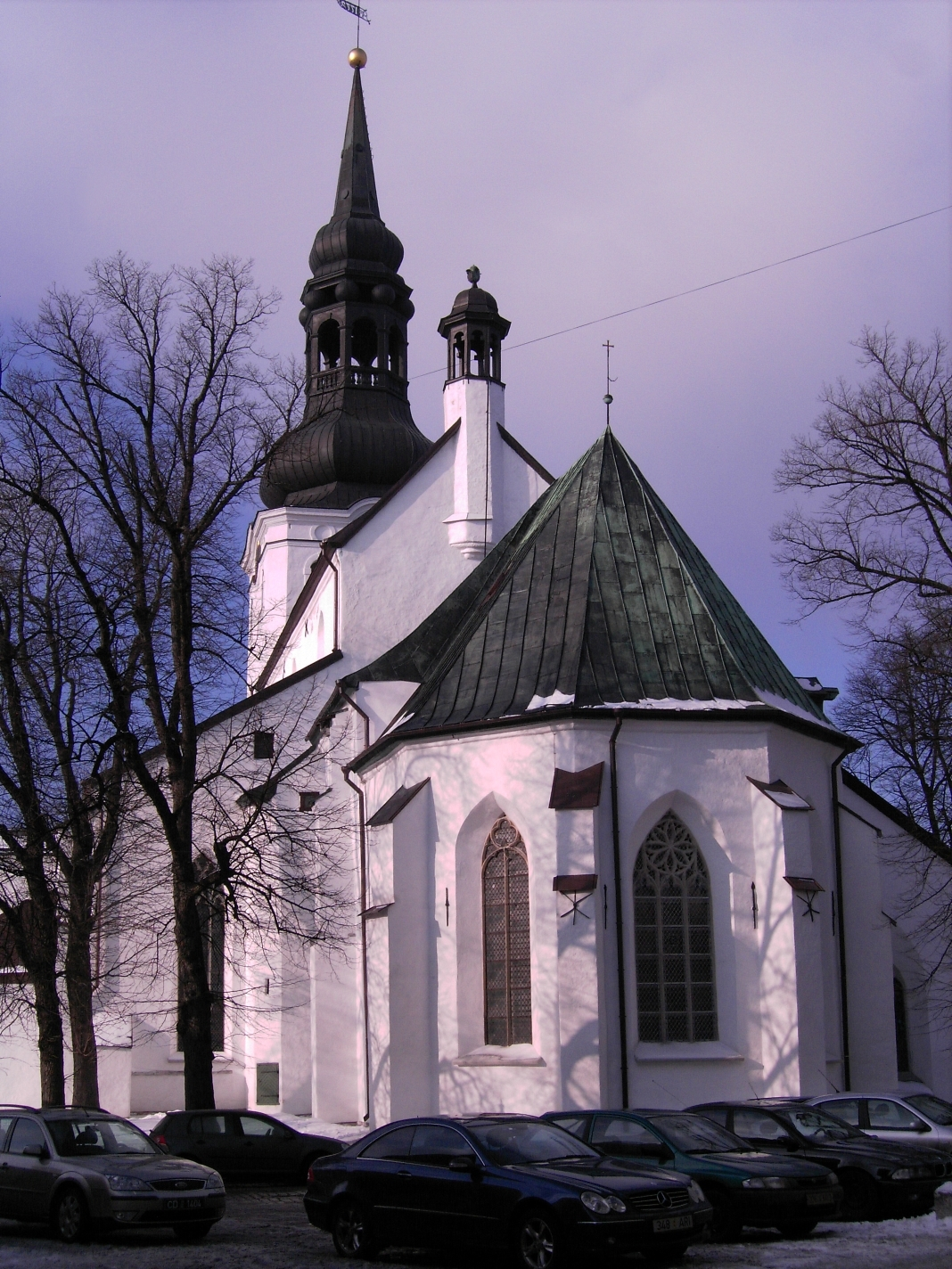 Tallinn Dom